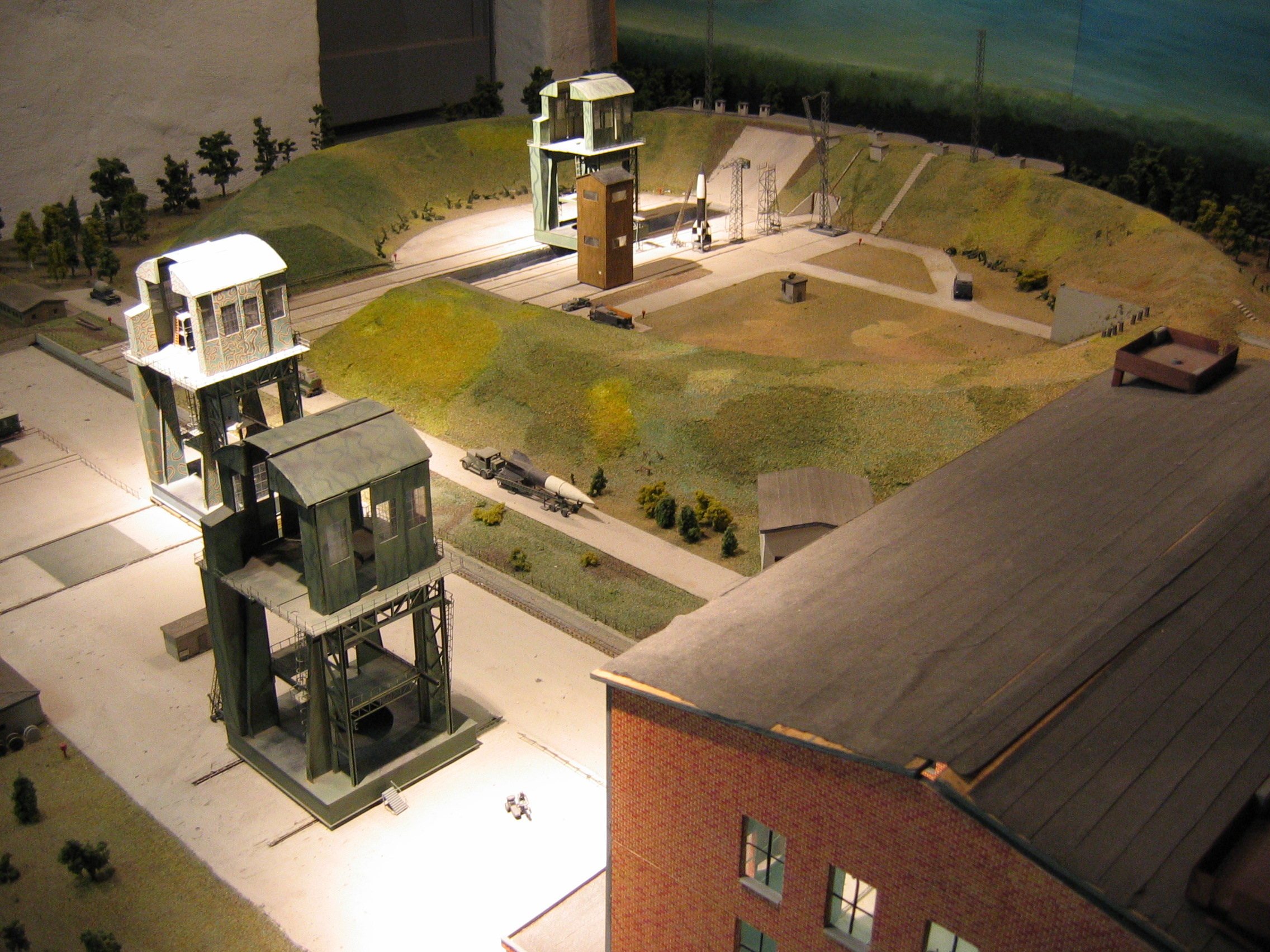 Modell des Prüfstands VII der Heeresversuchsanstalt Peenemünde im Historisch-Technischen Informationszentrum. Maßstab 1:87, gebaut 1992, Originalgröße 300x300 m.